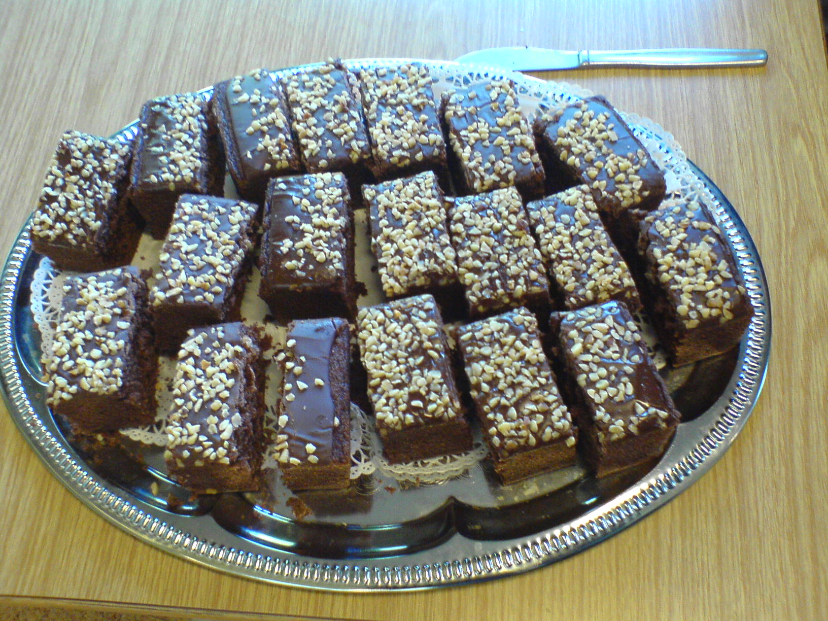 Chokoladekage